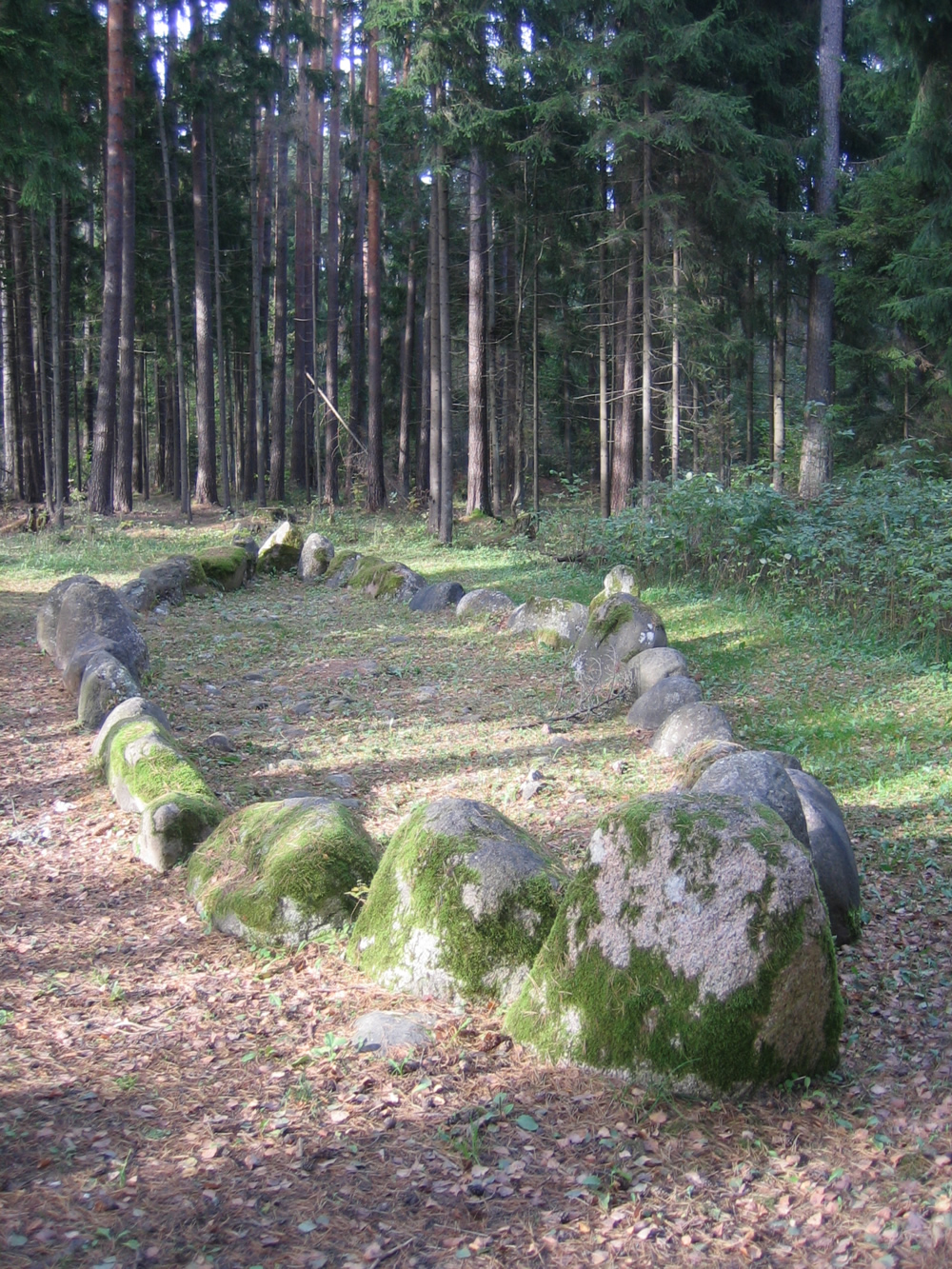 Bīlavu velna laiva